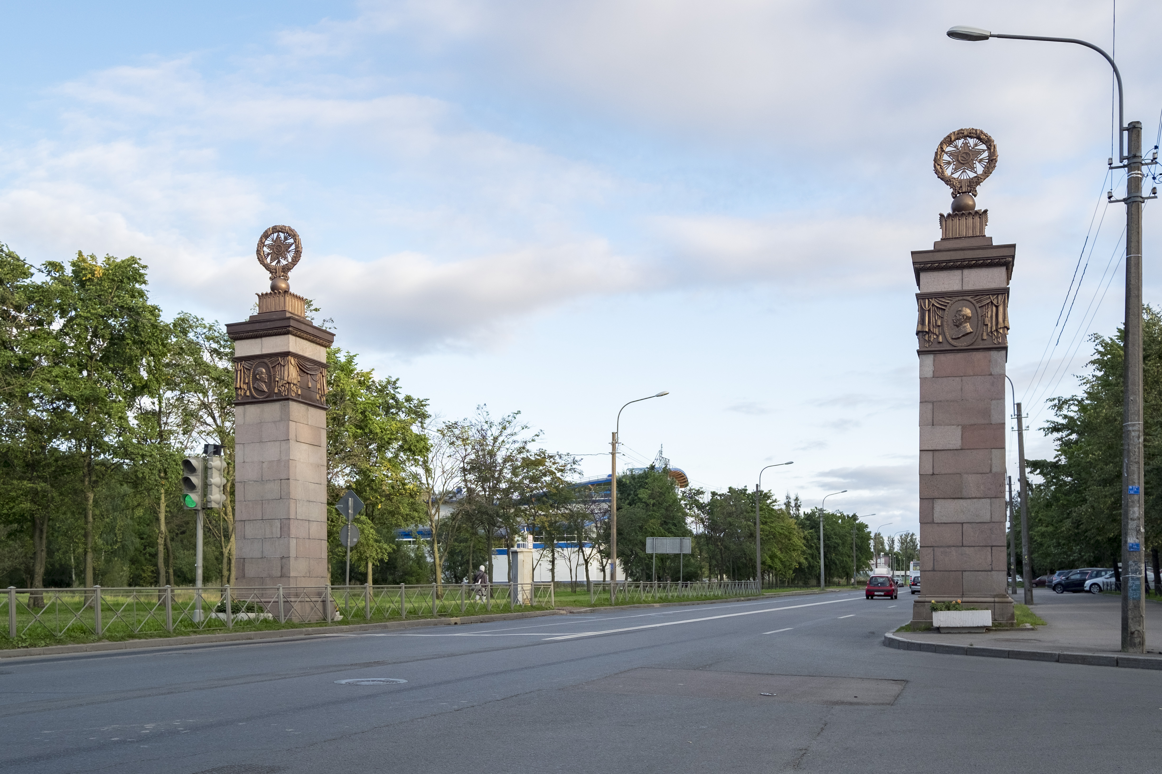 Триумфальные пилоны в честь защитников Ленинграда в годы Великой Отечественной войны (два): улица Коммуны, 50 сооружение 1 литера А, 51 сооружение 1 литера А, Красногвардейский район, Санкт-Петербург